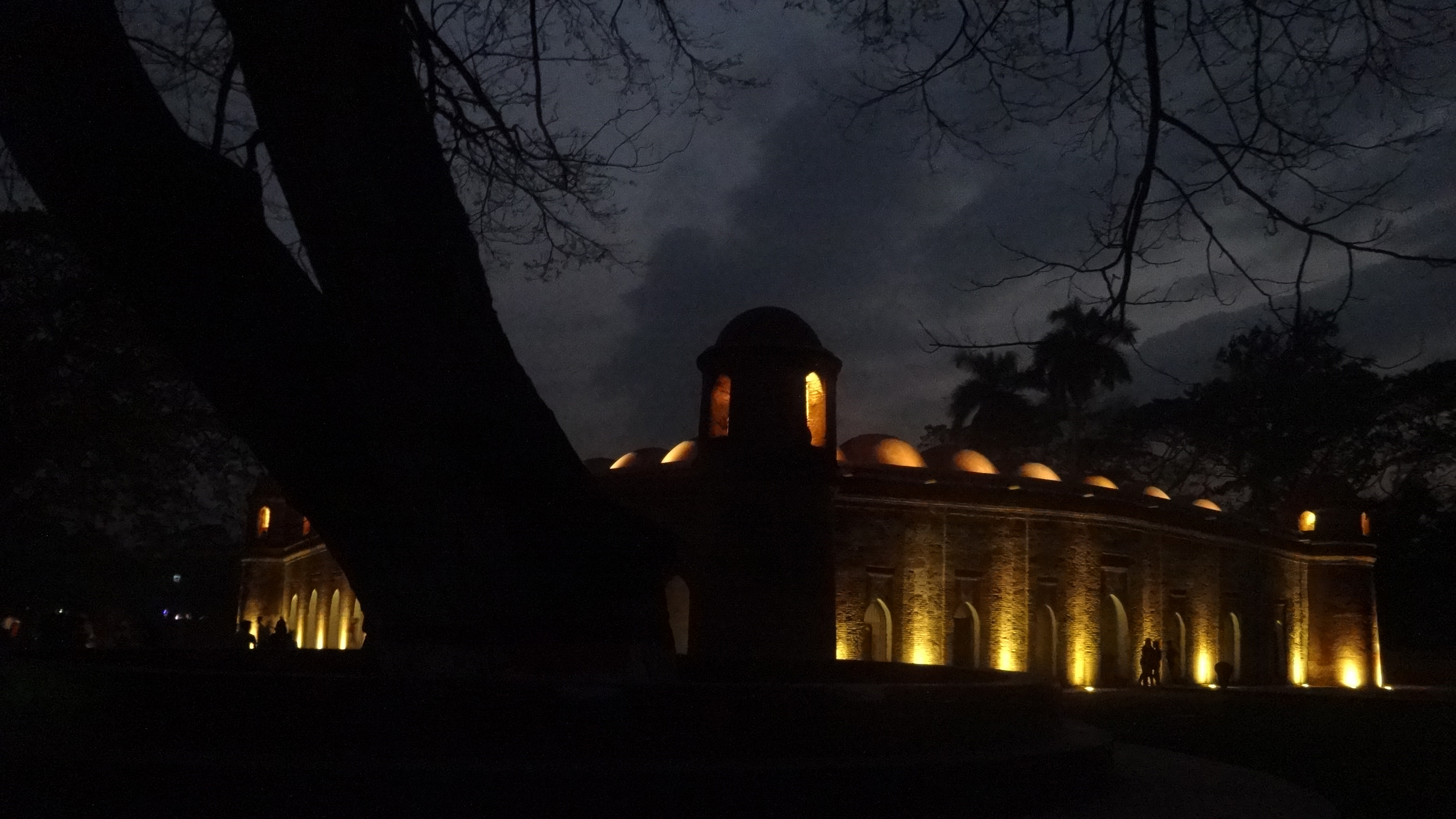 ষাট গম্বুজ মসজিদ